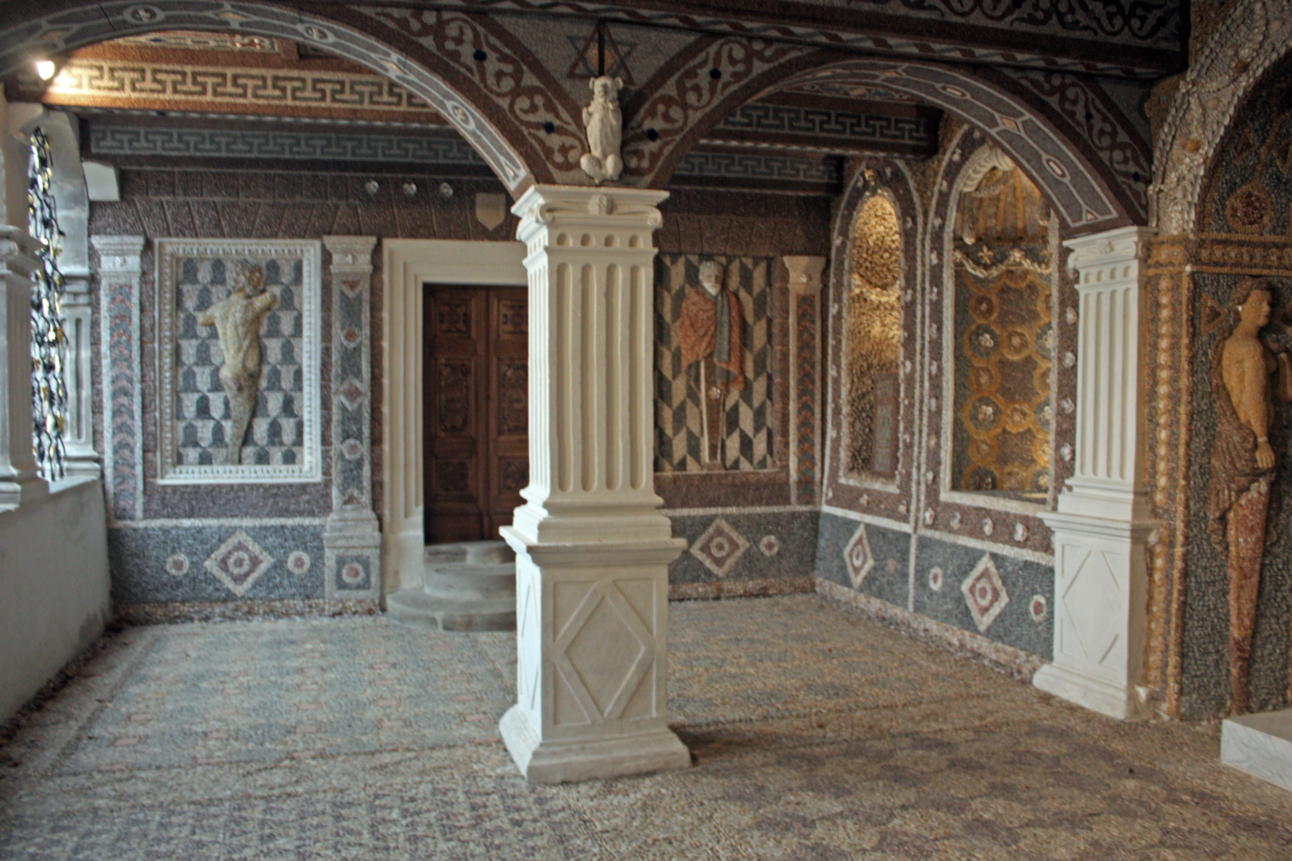 La salle des rocailles, à l'Italienne, est un lieu de fraîcheur. La présence d'eau en abondance est symbole de purification avant d'entrer dans la chapelle. De part et d'autre de la porte de la chapelle, les allégories du Printemps et de l'Hiver